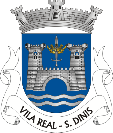 Brasão da freguesia de São Dinis (concelho de Vila Real)